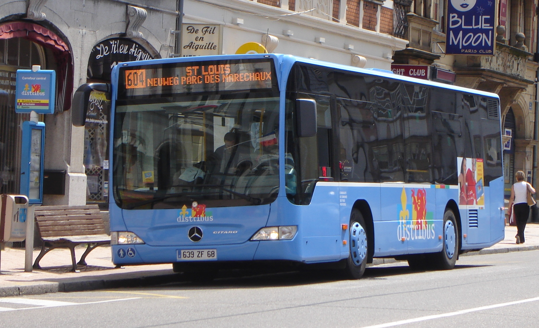 Citaro K de la ville de Saint-Louis